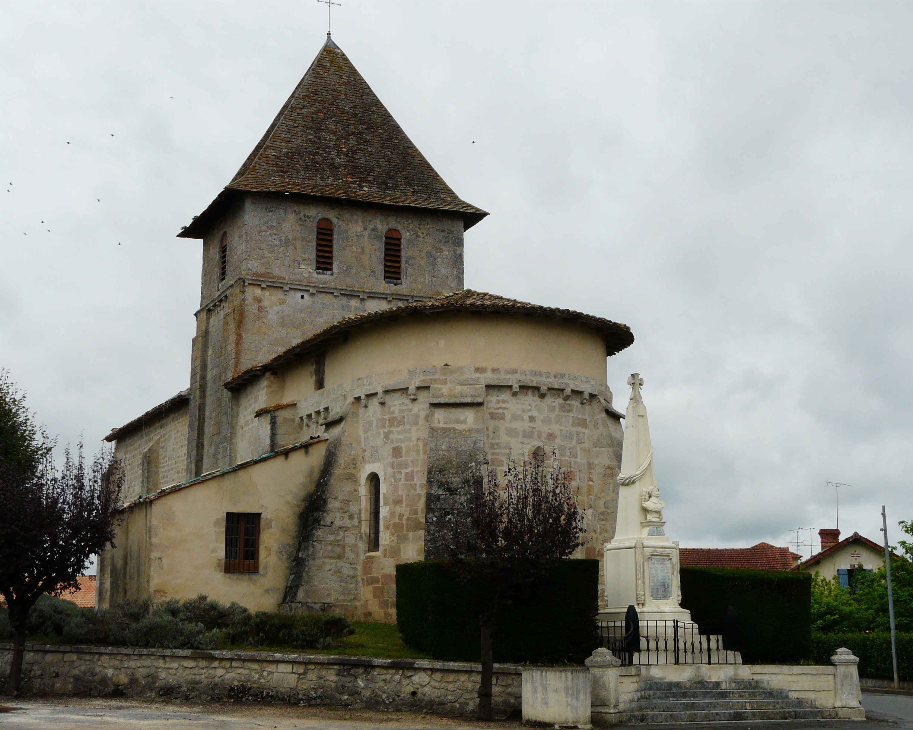 L'église de Saint-Martin-de-Gurson, Dordogne, France.